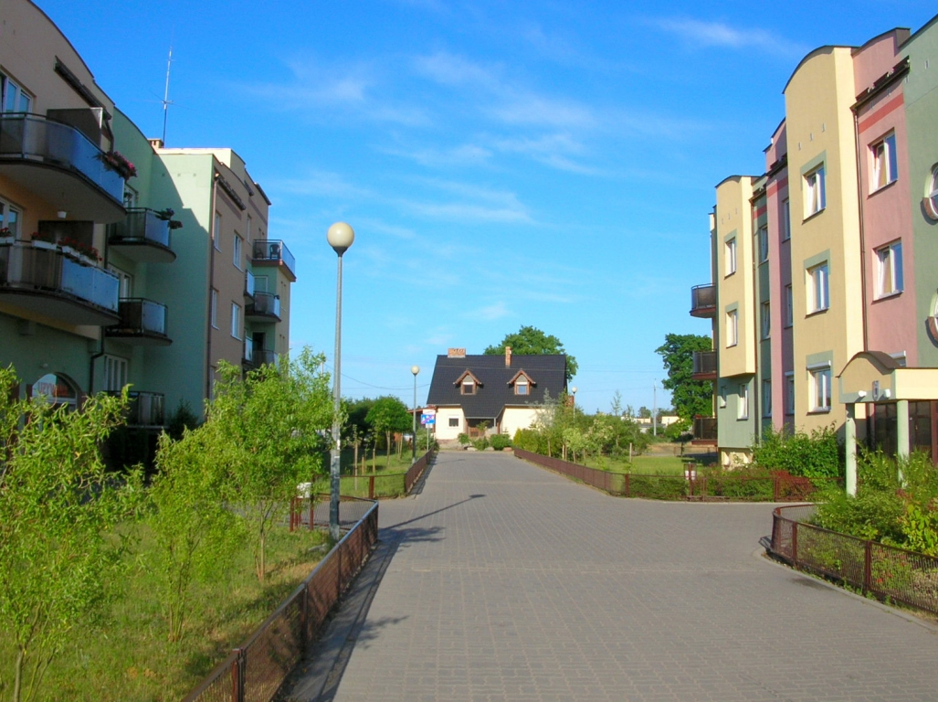 Budynki mieszkalne wielorodzinne na os. Osowa Góra w Bydgoszczy